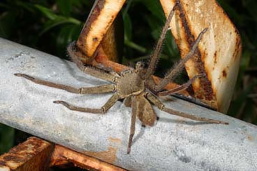 female Heteropoda venatoria from Okinawa.